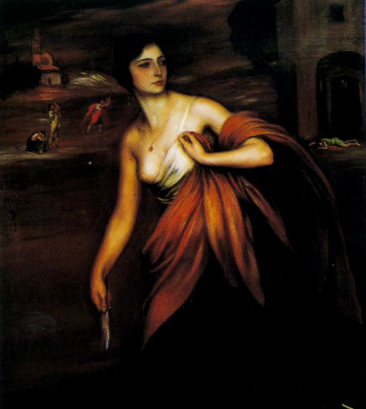 La chica de la navaja. Julio Romero de Torres. Óleo y temple sobre lienzo. 120 x 105 cm.